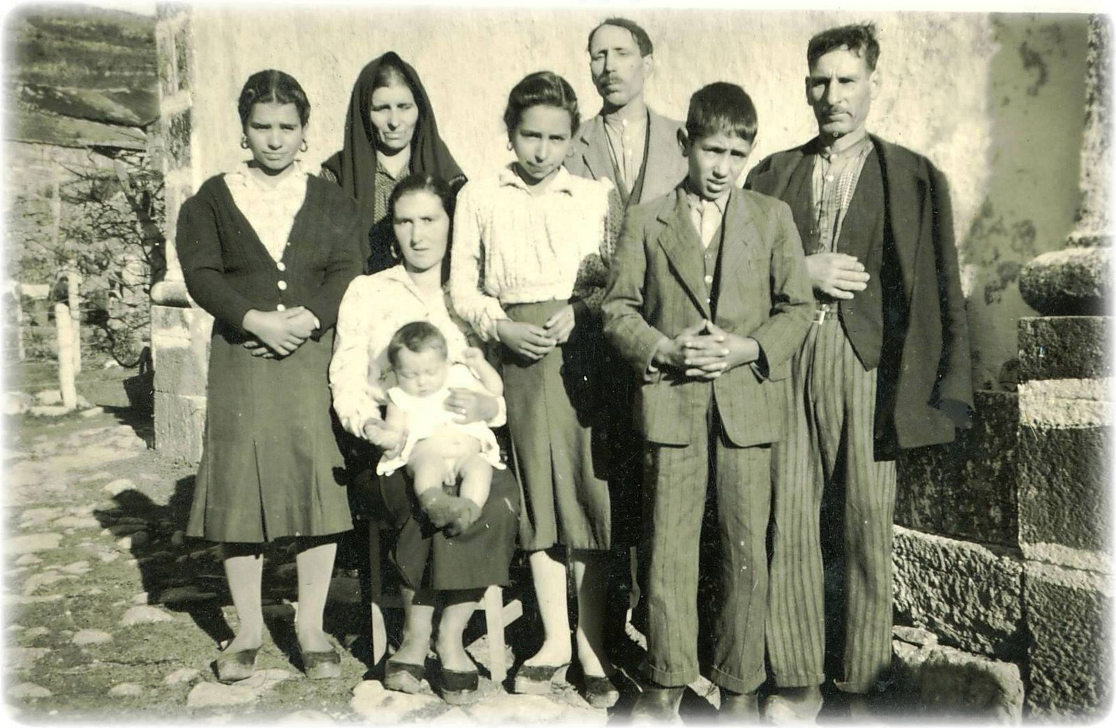 Pessoas da localidade de Custilhão (c.1950), concelho de Castro Daire, Viseu, Portugal.